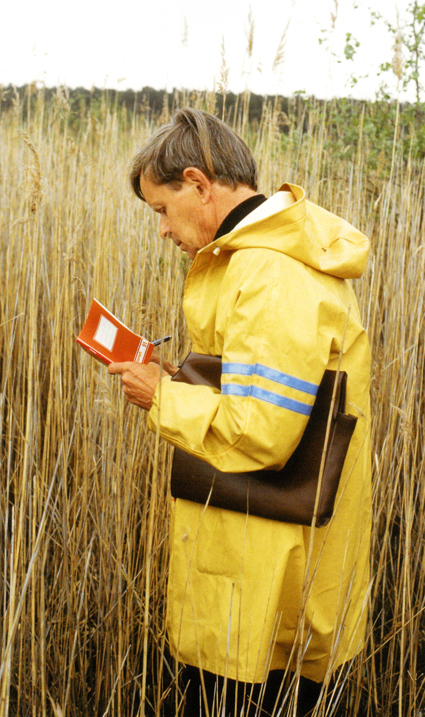 Erwin A. Patzke 1990 Elmpter Bruch (mit freundlicher Genehmigung von Rainer Galunder)